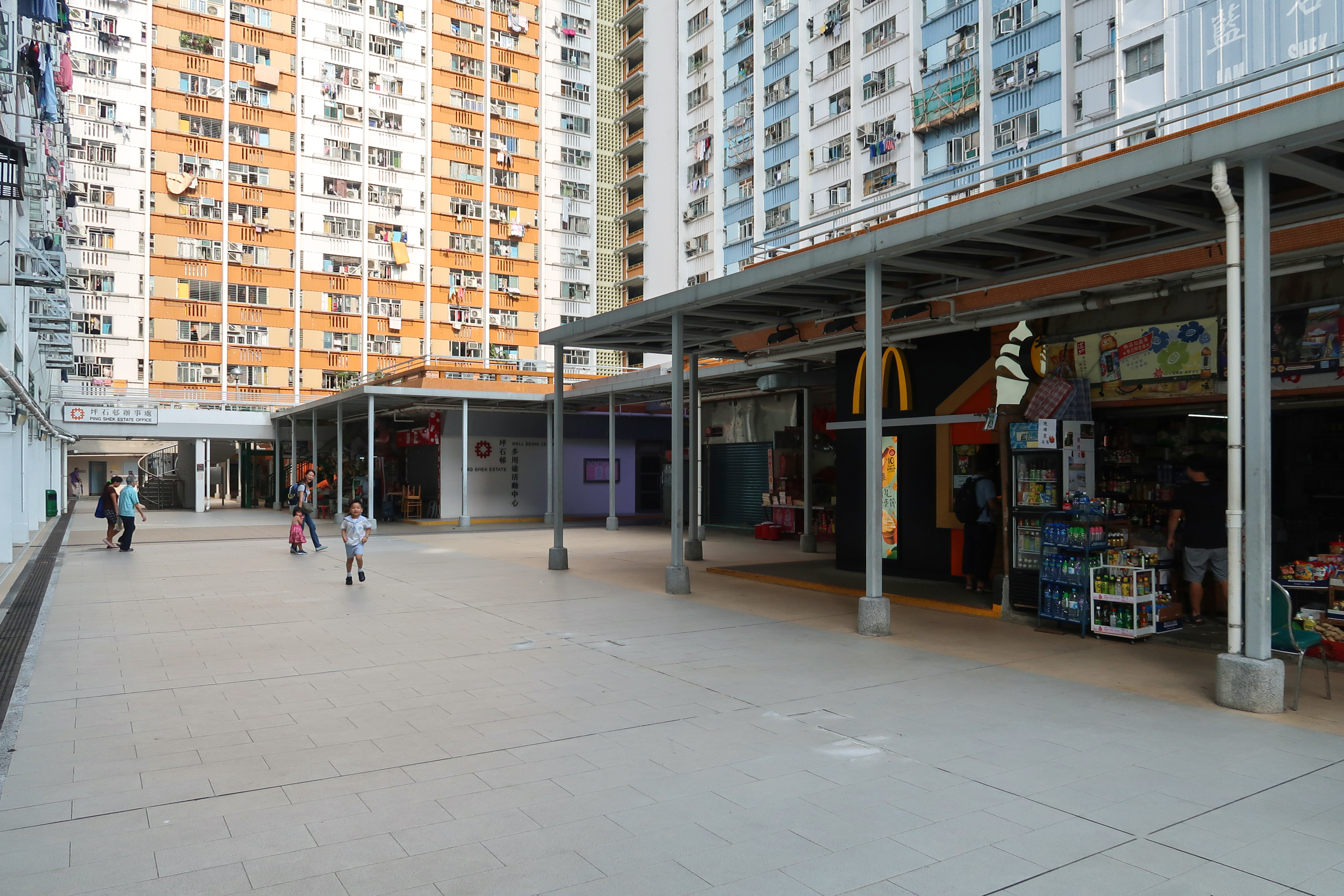 Ping Shek Estate Market